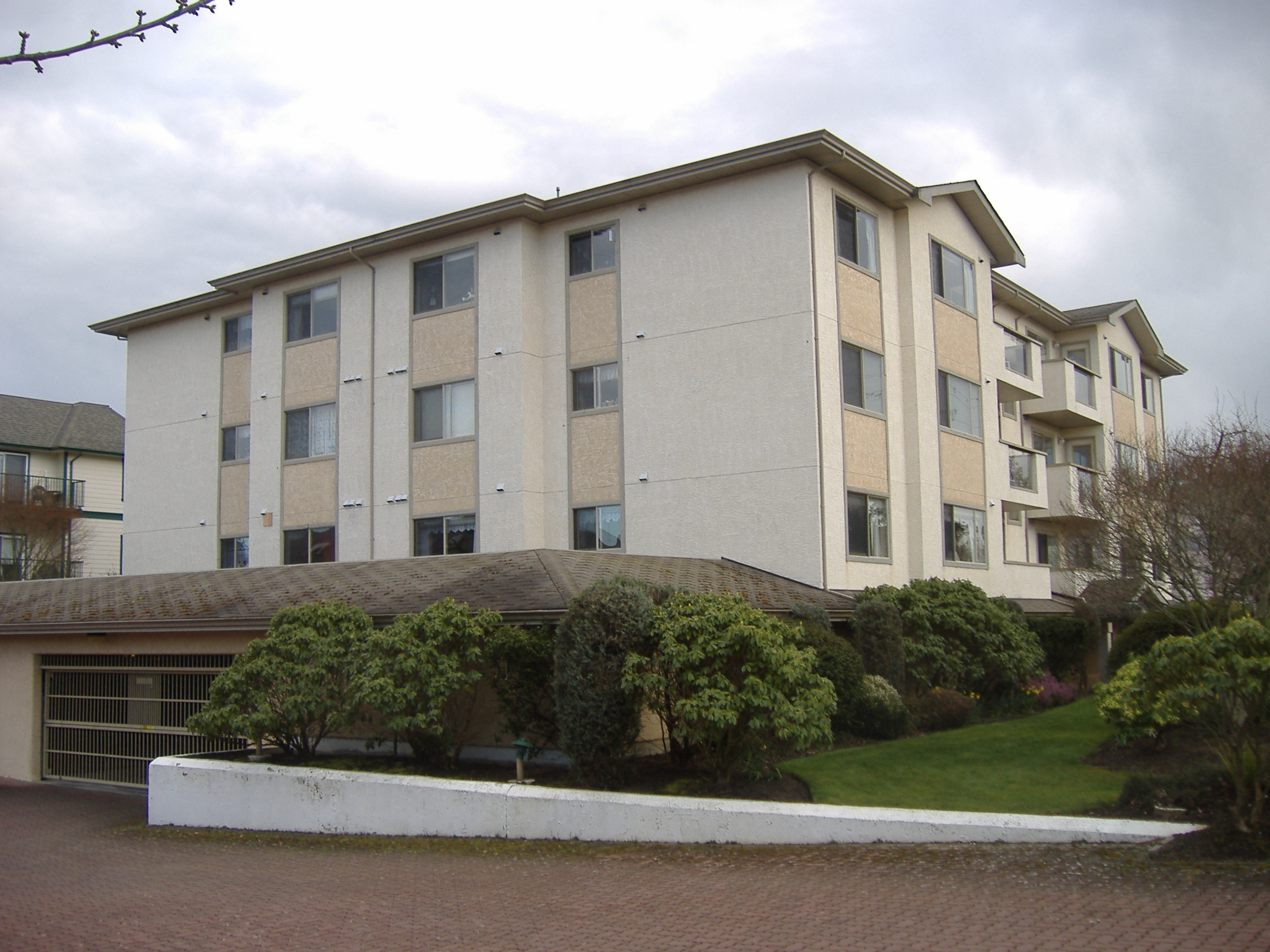 Condominium